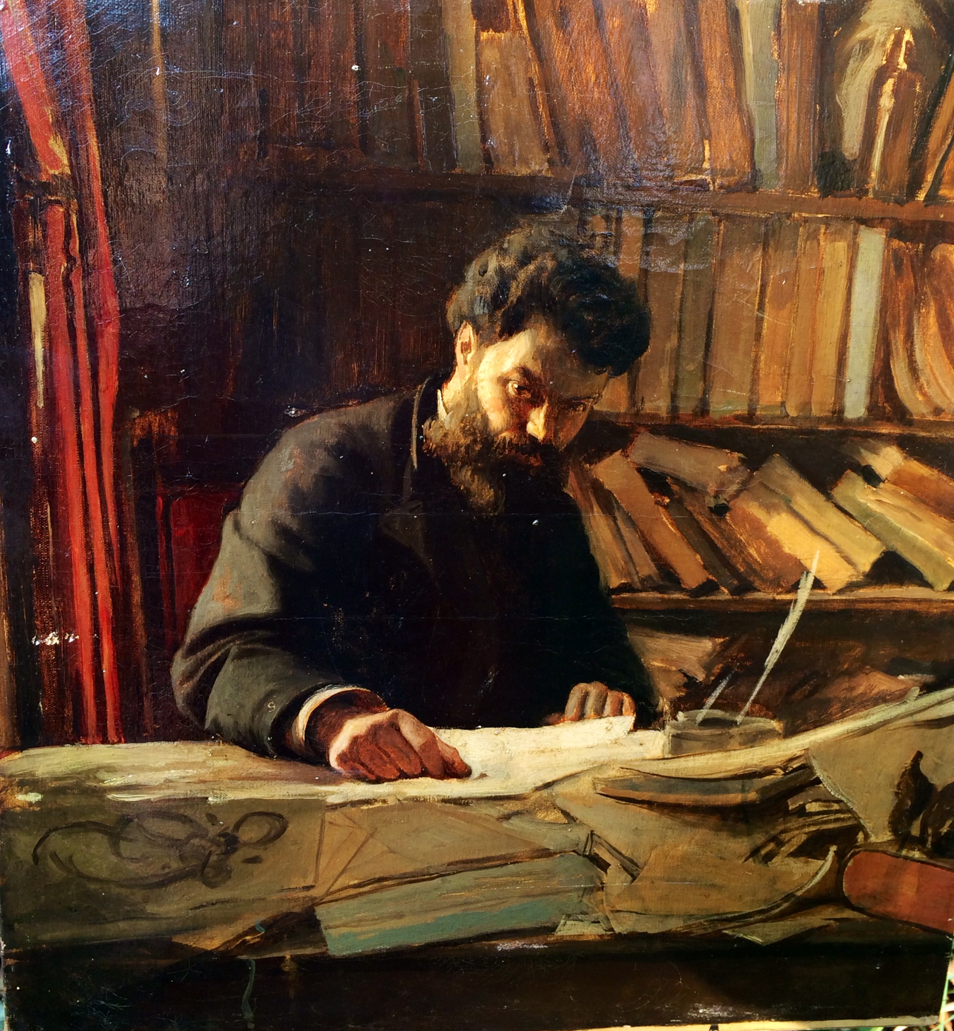 Photography of Oil on canvas by Louis Welden Hawkins around 1880 - Portrait of Camille Pelletan